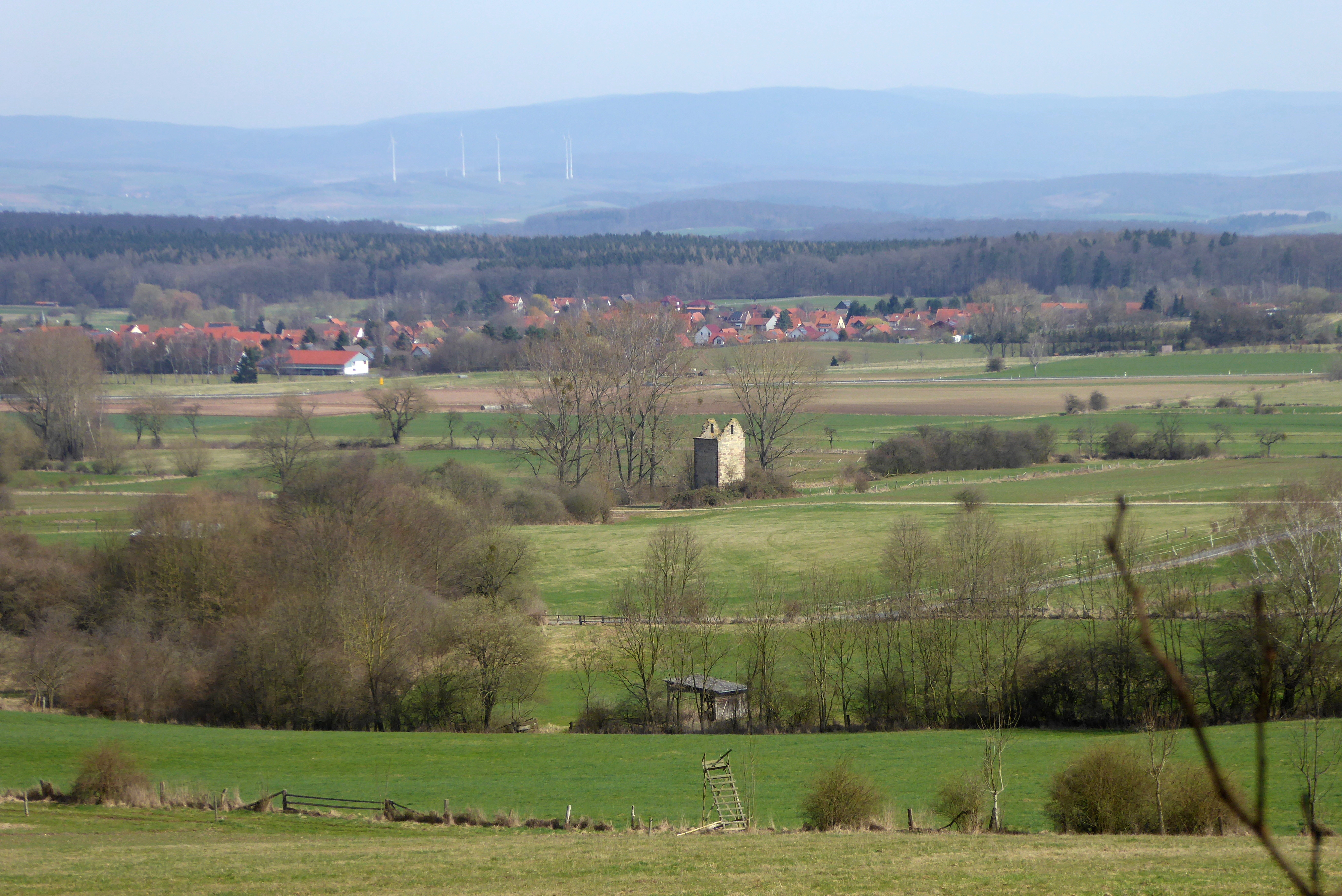 Blick vom Nordhang des Göttinger Waldes nach Nordosten auf die Wüstung Moseborn mit dem Mäuseturm (Bildmitte). Dahinter Holzerode, Gemeinde Ebergötzen, Südniedersachsen.